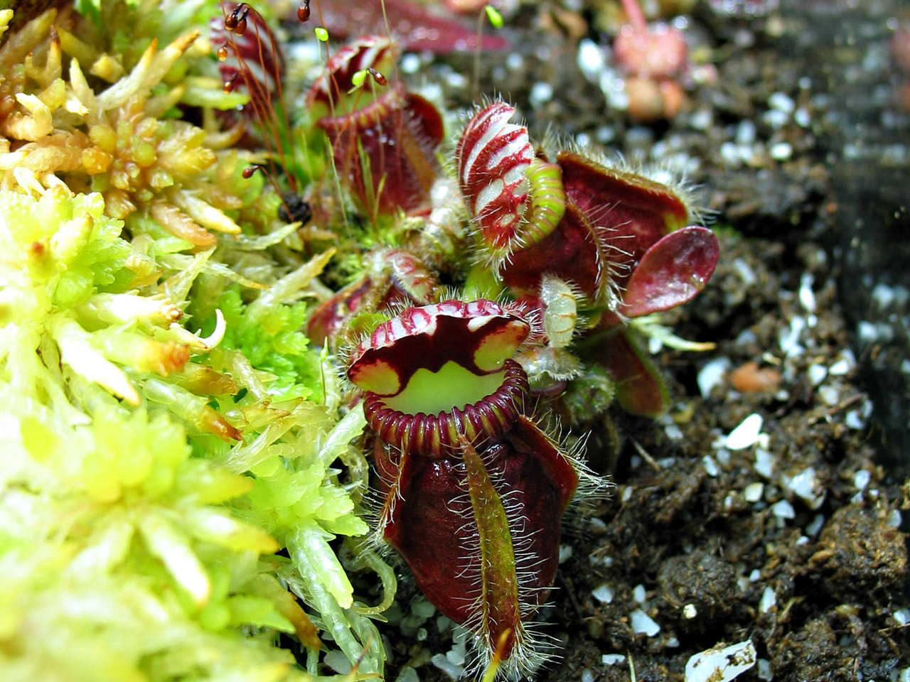 Cephalotus follicularis - plante cultivée en terrarium sous lumière artificielle